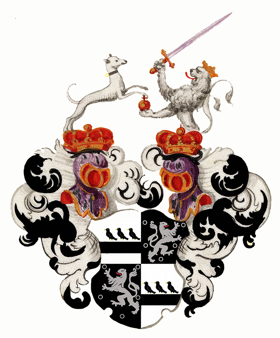 Freiherrliches Wappen aus der Zeit um 1690